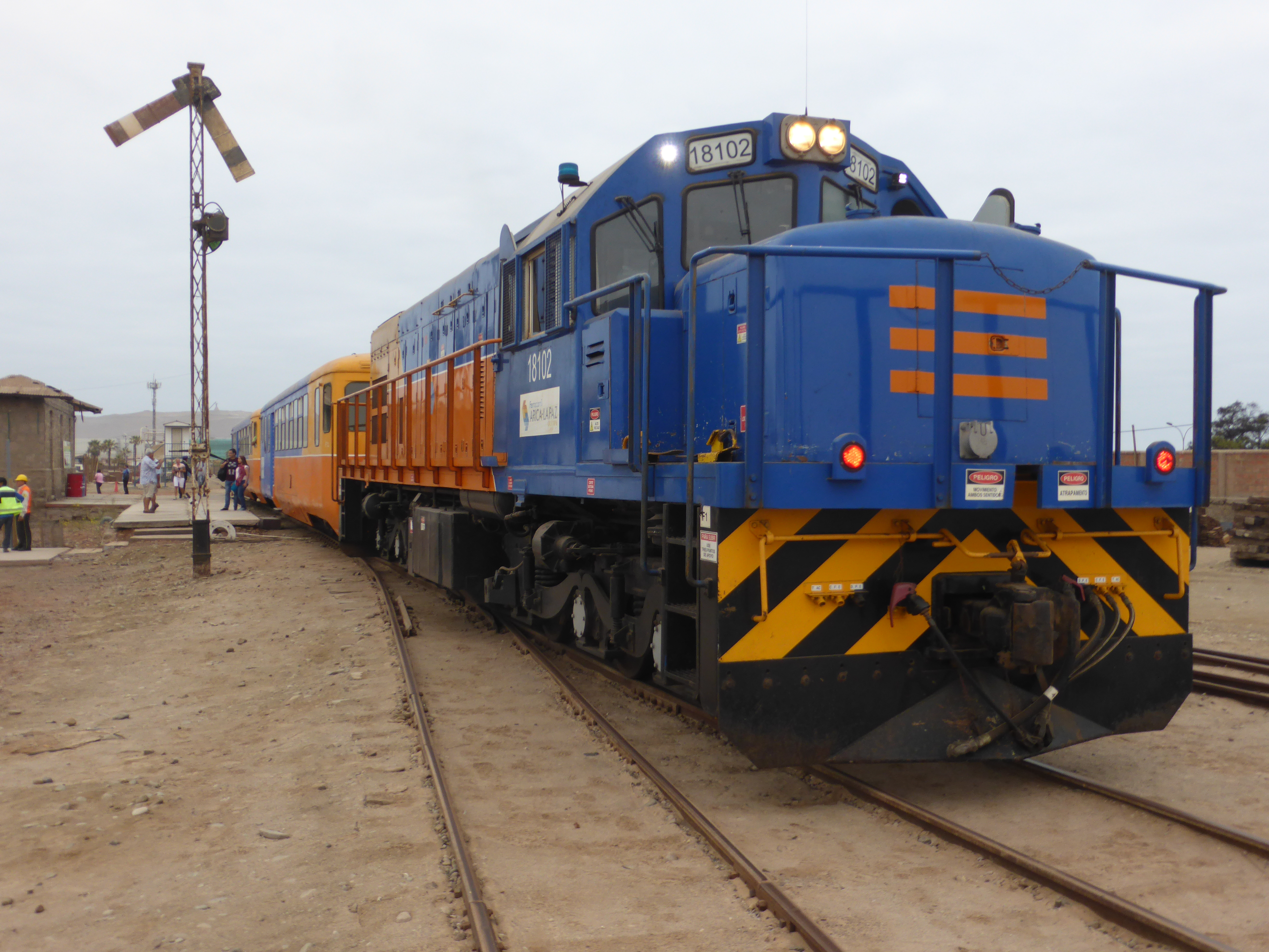 Partida de un tren turístico en la estación Chinchorro (Arica). Destino estaciones Poconchile y Central. Locomotora diésel número 18102.